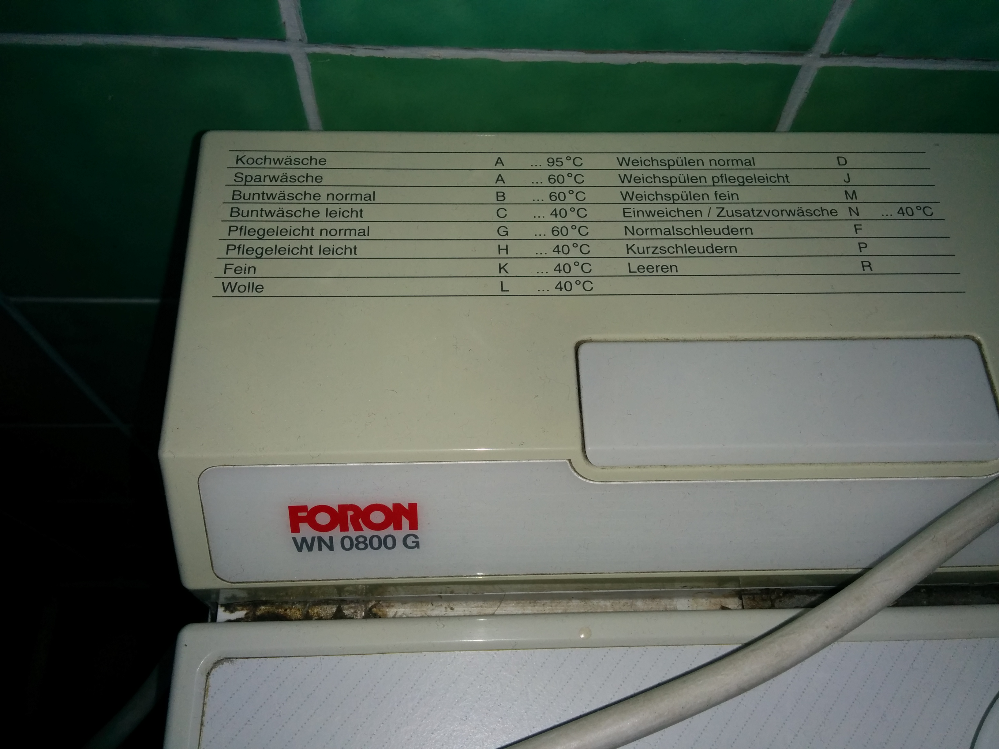 Typschild einer Foron-Waschmaschine Typ WN 0800 G